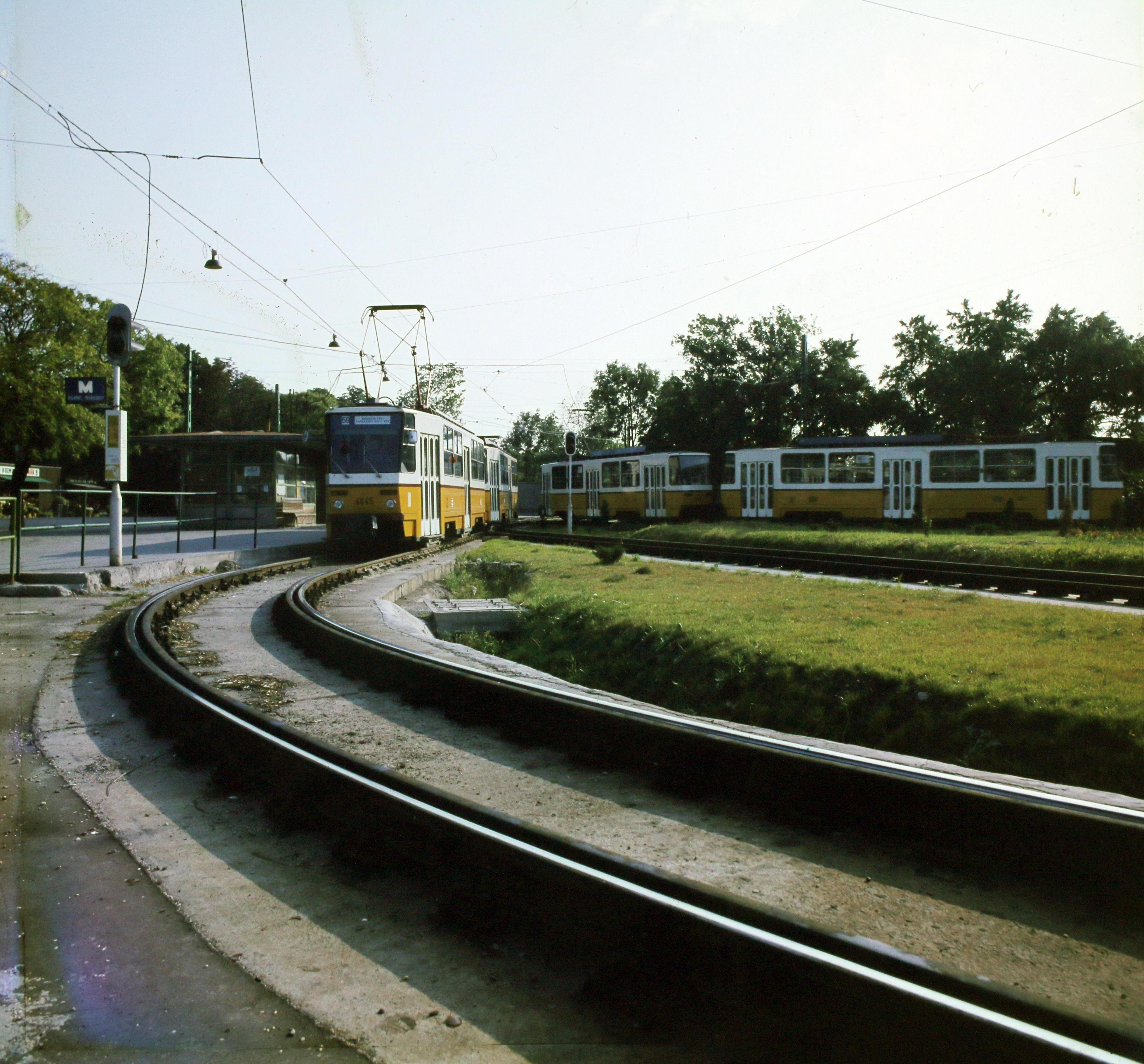 Márton Áron (Kis Ferenc) tér, az 59-es villamos végállomása a Farkasréti temető felső bejáratánál. Location: Hungary, Budapest XII. Tags: colorful, tram, Tatra-brand, Czechoslovak brand, Budapest Title: Márton Áron (Kis Ferenc) tér, az 59-es villamos végállomása a Farkasréti temető felső bejáratánál.